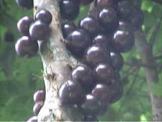 Jubuticaba. Foto obtida em 2005, em Curitiba, Pr - Brasil, por Altevir Vechia